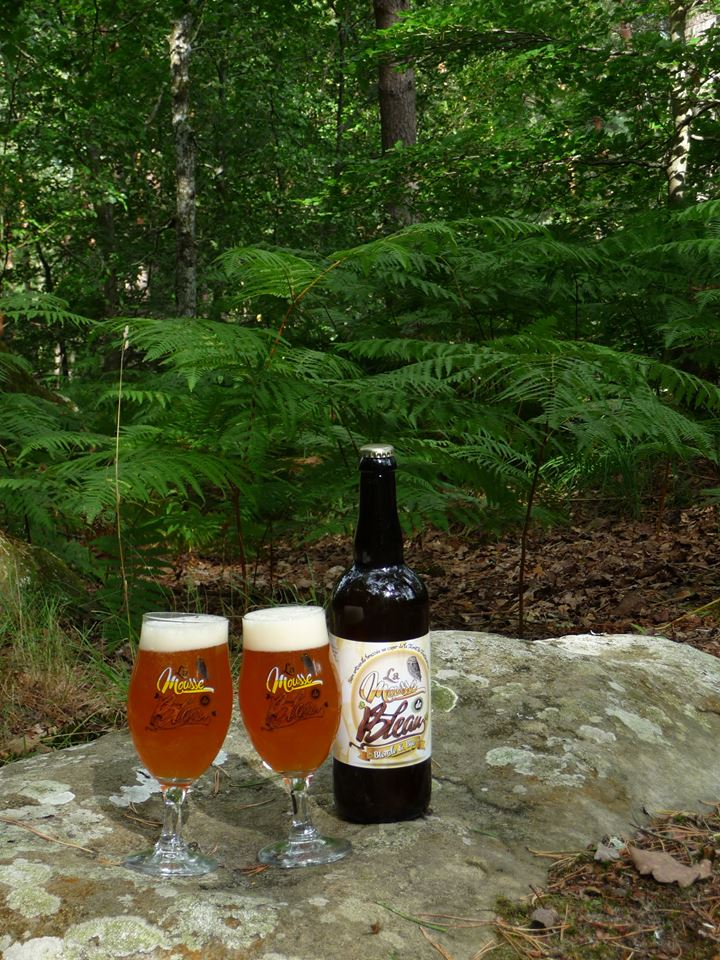 Bière bio de la Forêt de Fontainebleau